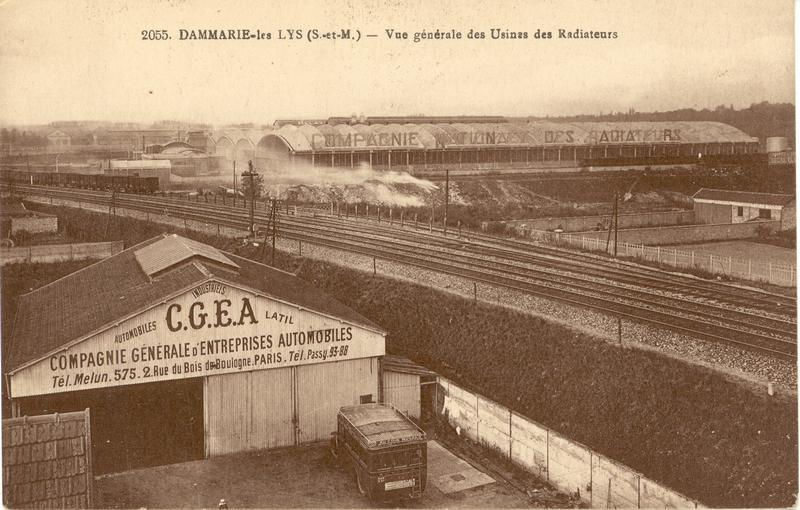 Usines de radiateur de Dammarie-les-lys en 1935.